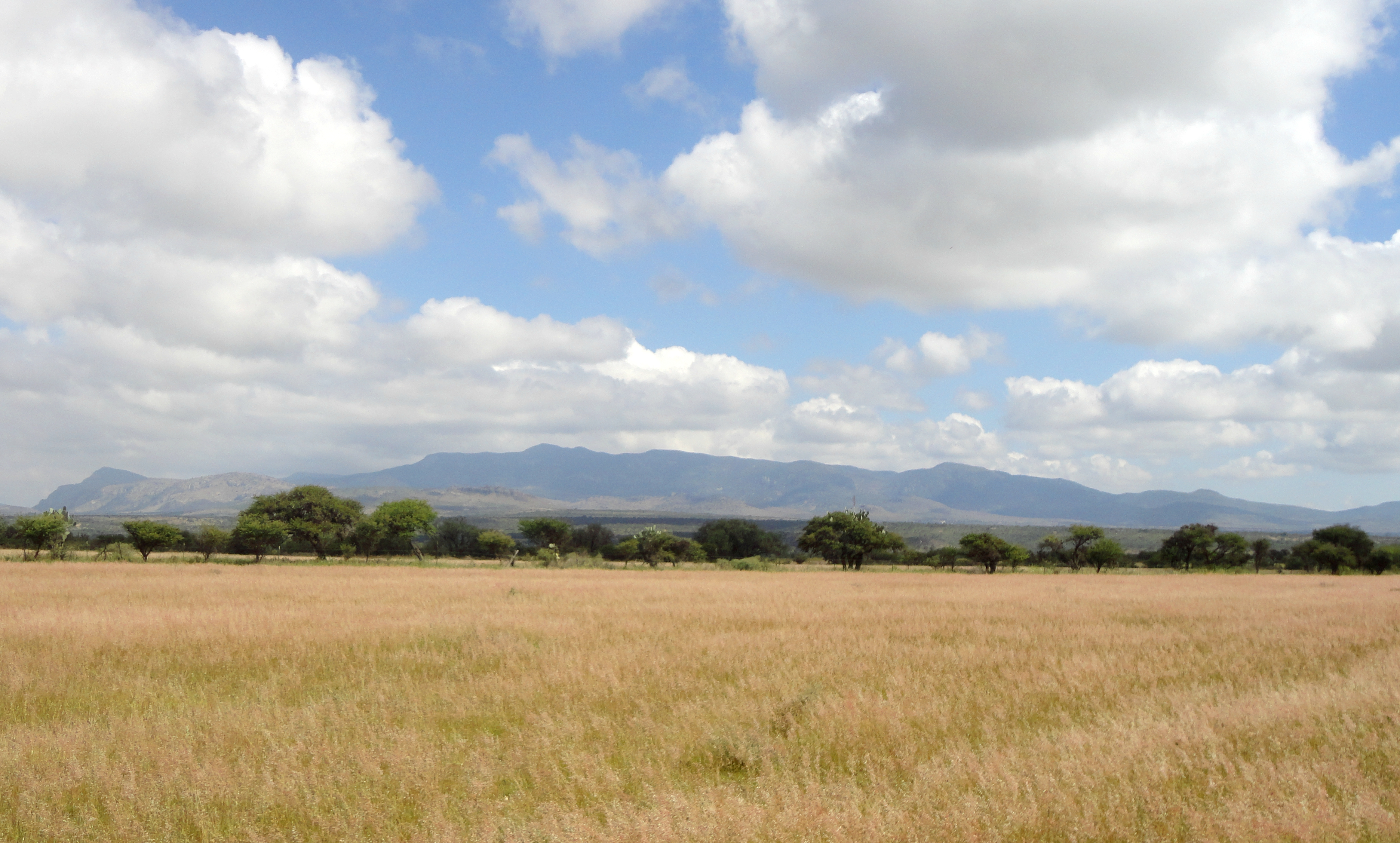 Sierra del Cubo, San Felipe, Guanajuato, México - Vista desde la comunidad de La Quemada.